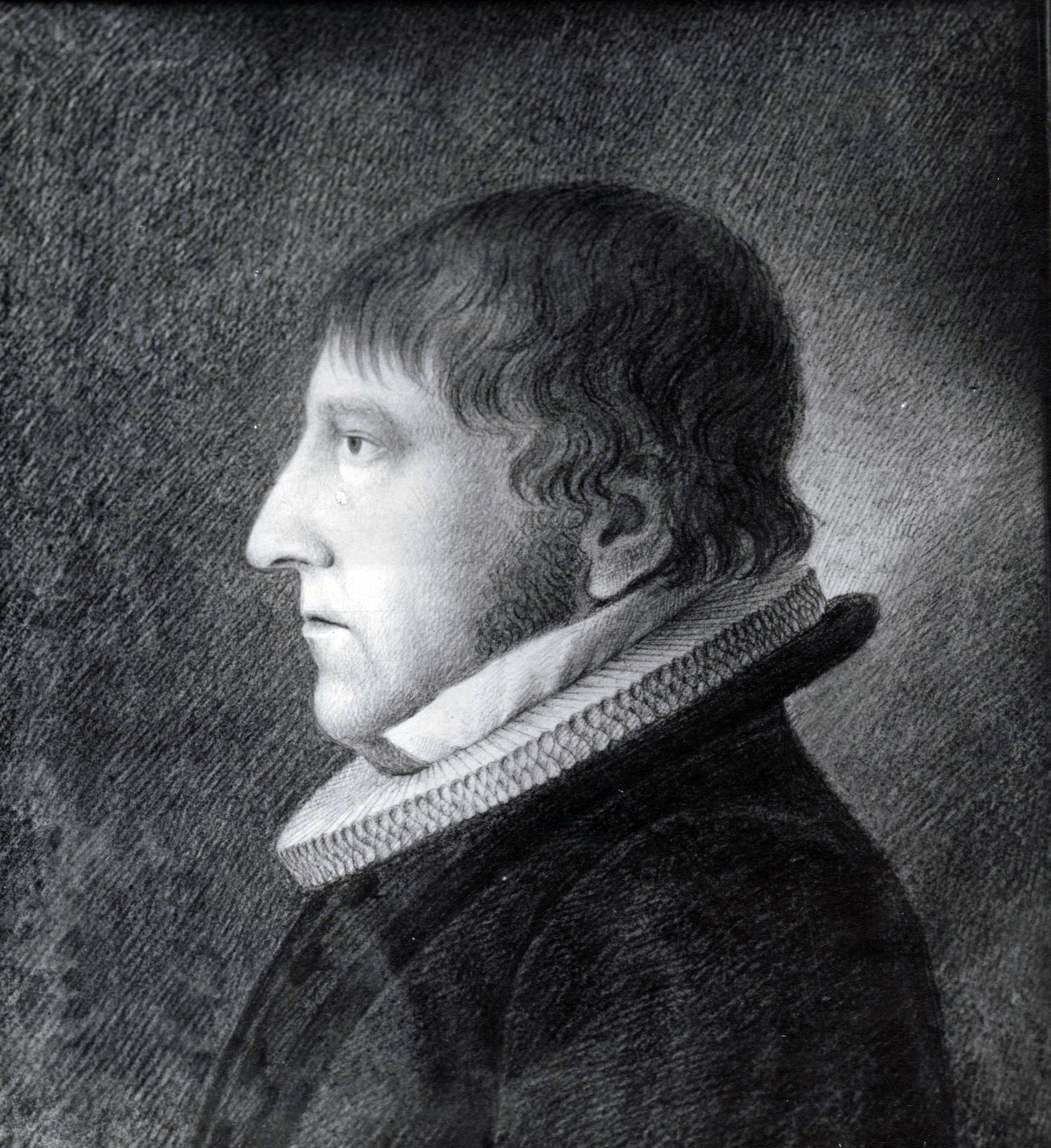 Format: Fotopositiv. (original kulltegning) Dato / Date: Ukjent (antagelig 1897) Kunstner / Artist: Jacob Petersen Fotograf / Photographer: Ukjent (antagelig Erik Olsen) Sted / Place: Trondheim Eier / Owner Institution: Trondheim byarkiv, The Municipal Archives of Trondheim Arkivreferanse / Archive reference: Tor.H41.B45.F3288